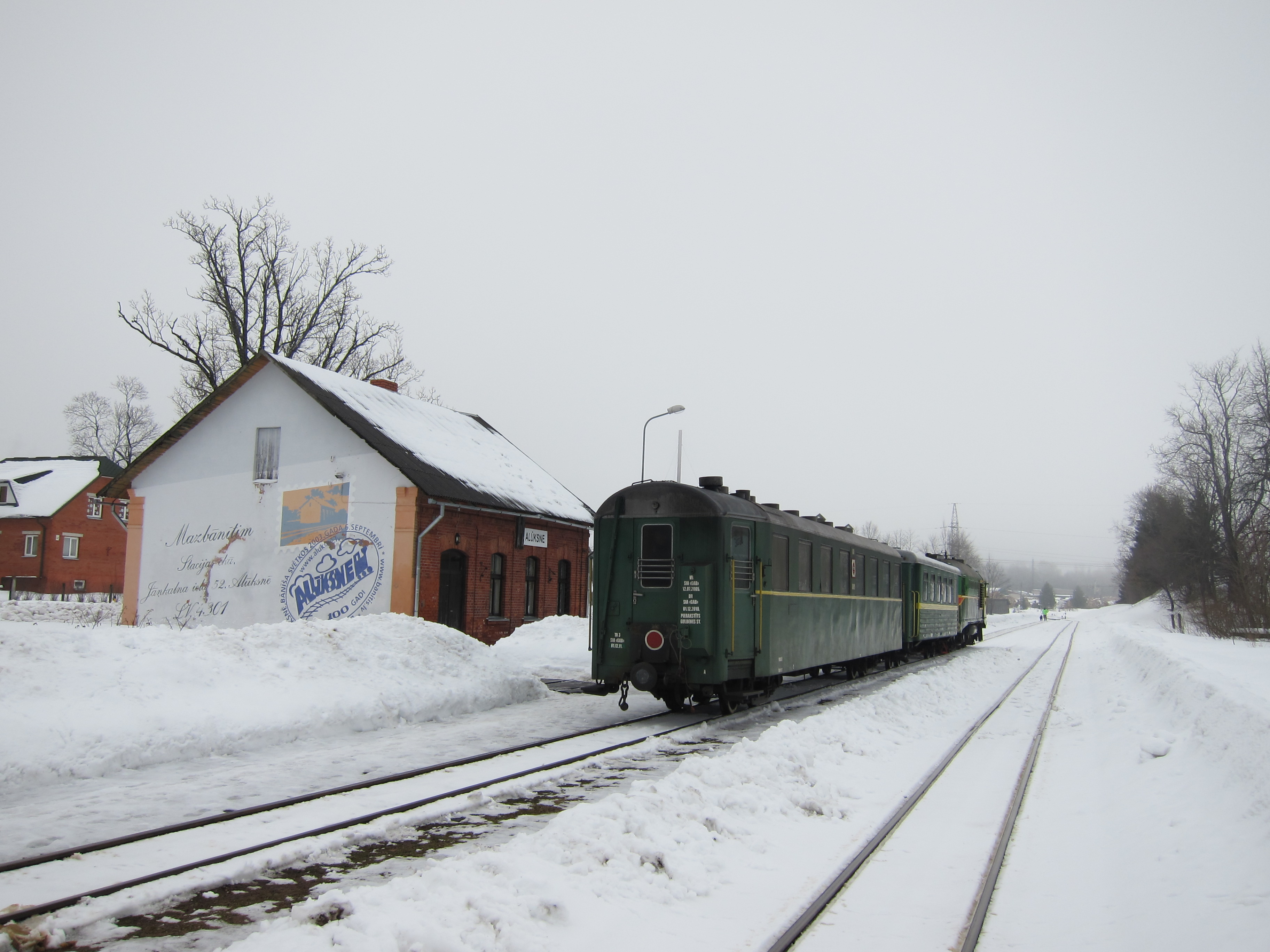 Alūksnes stacija